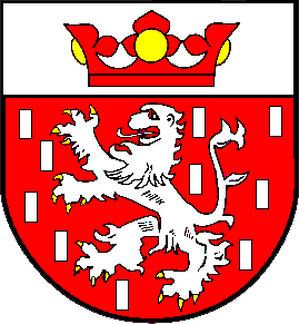 Wappen von Ehlenz